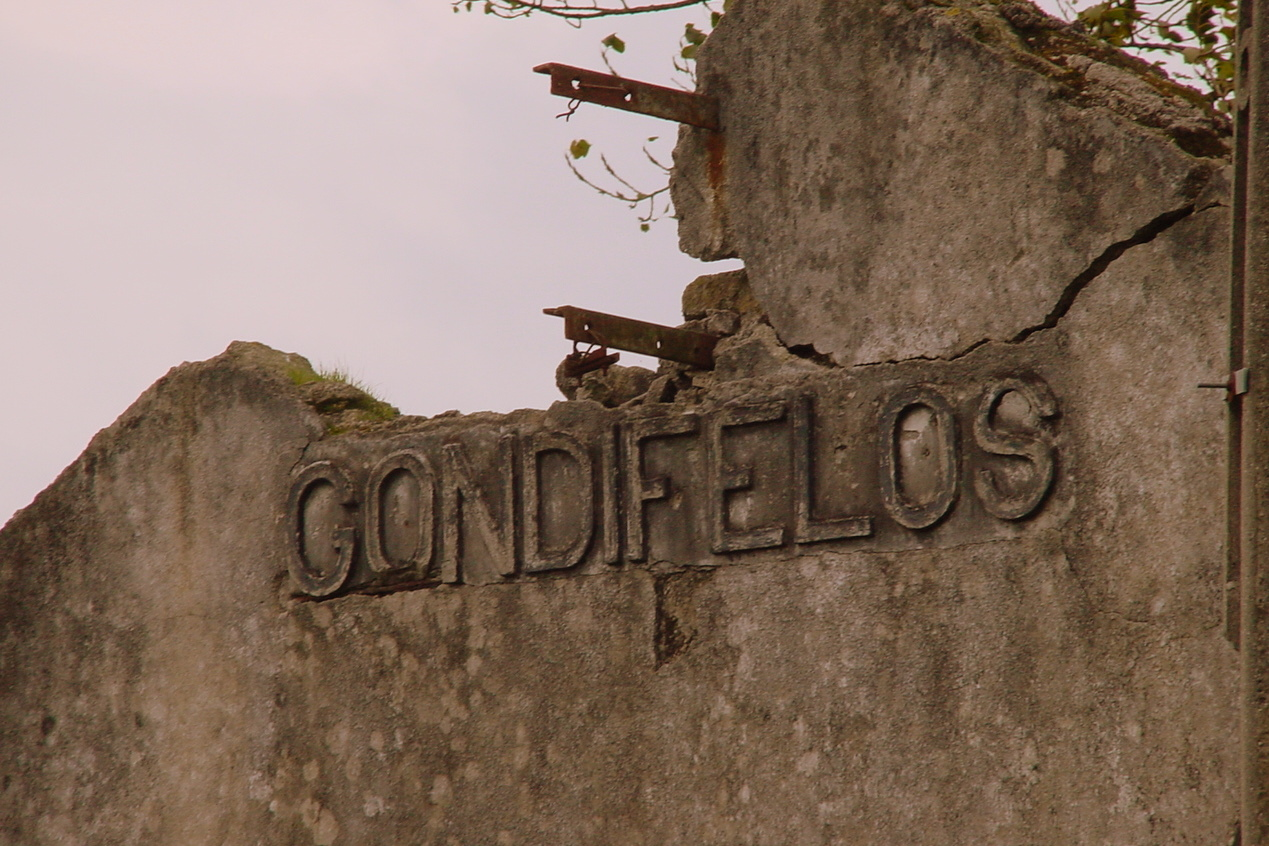 Restos da antiga estação de caminhos de Ferro de Gondifelos - Vila Nova de Famalicão, Portugal